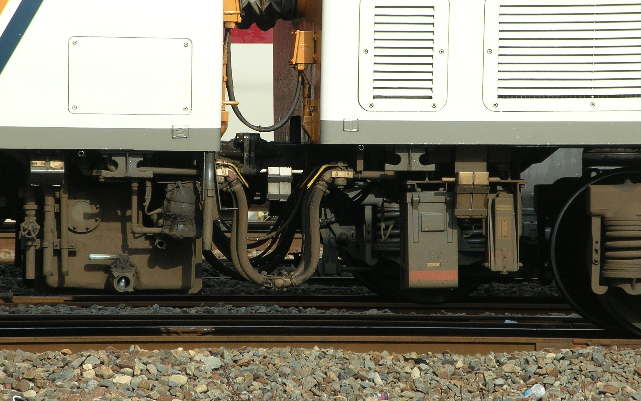 近鉄30000系のMc車とT車の床高さの違いを示す写真